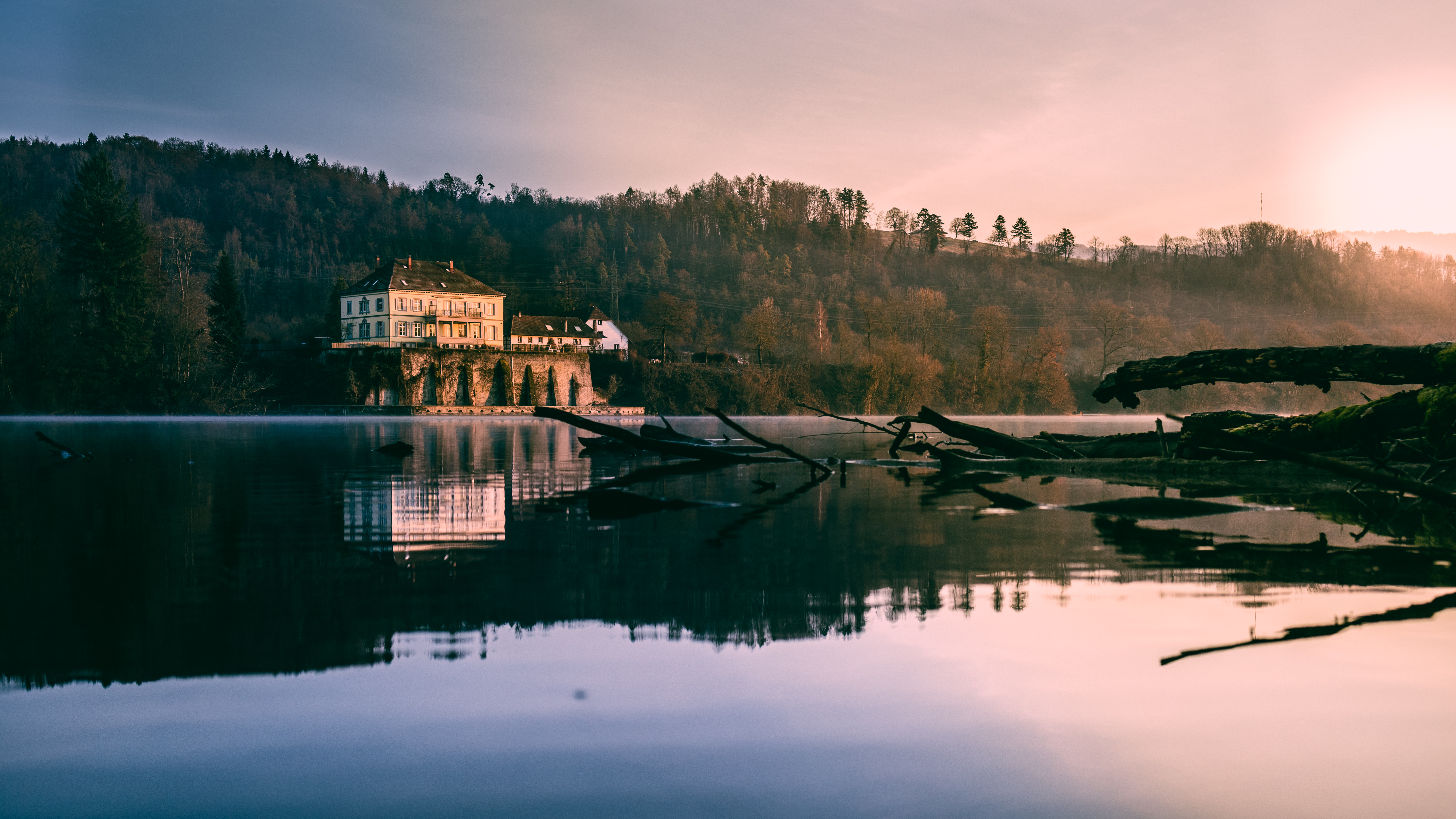 Schloss Schwörstadt am frühen Morgen von der schweizer Rheinseite aus gesehen. Im Hintergrund ist der Dinkelberg und der Engberg zu sehen.